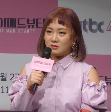 26일 오후 서울시 마포구 상암동 JTBC 사옥에서 JTBC4 신규 예능프로그램 ‘마이 매드 뷰티3’ 제작발표회가 열려 한혜진, 박나래가 기자와의 질의 응답시간을 갖고 있다.